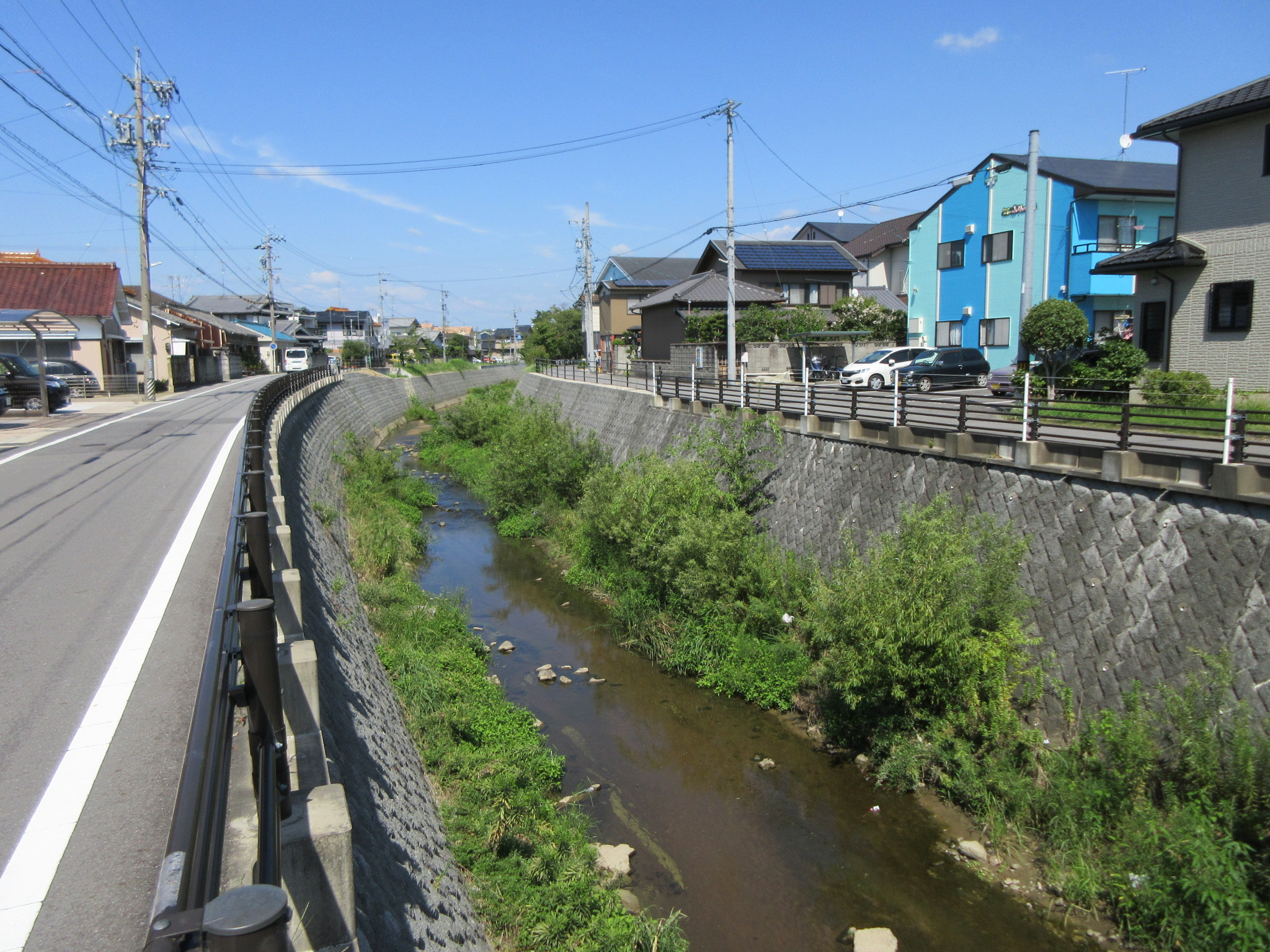 伊賀川（岡崎市元能見町、柿田町）